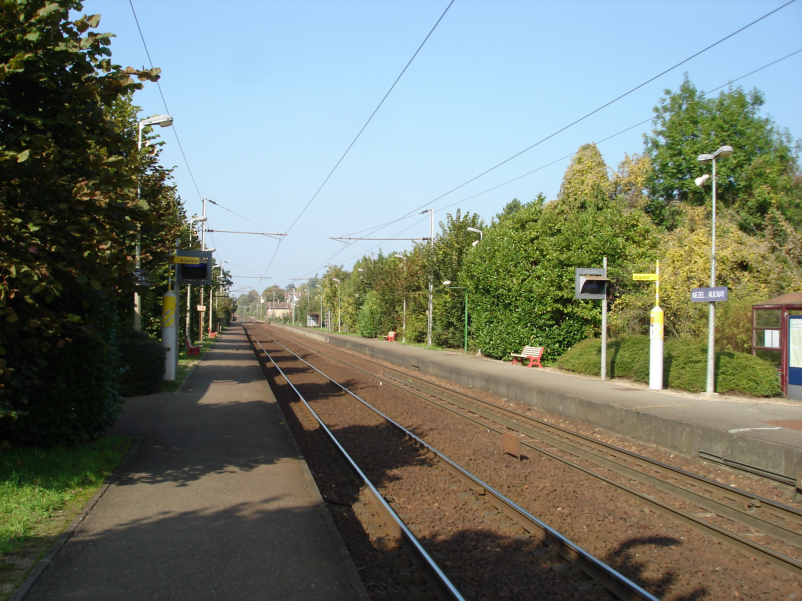 Gare de Nézel - Aulnay (78) : Vue en direction de Mantes-la-Jolie, du quai pour Mantes-la-Jolie.